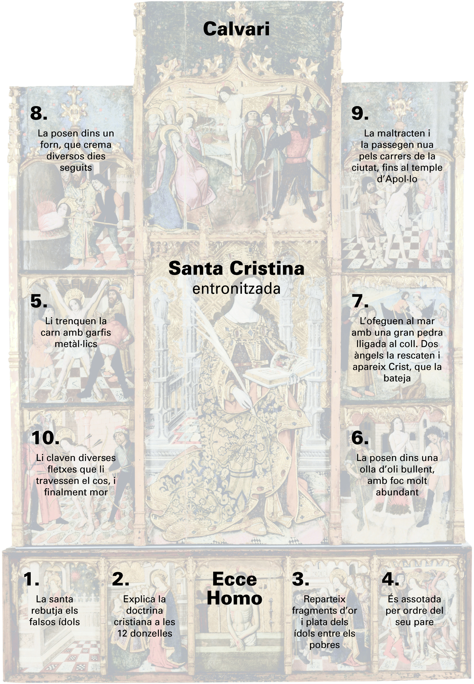 Identifació iconogràfica del retaule